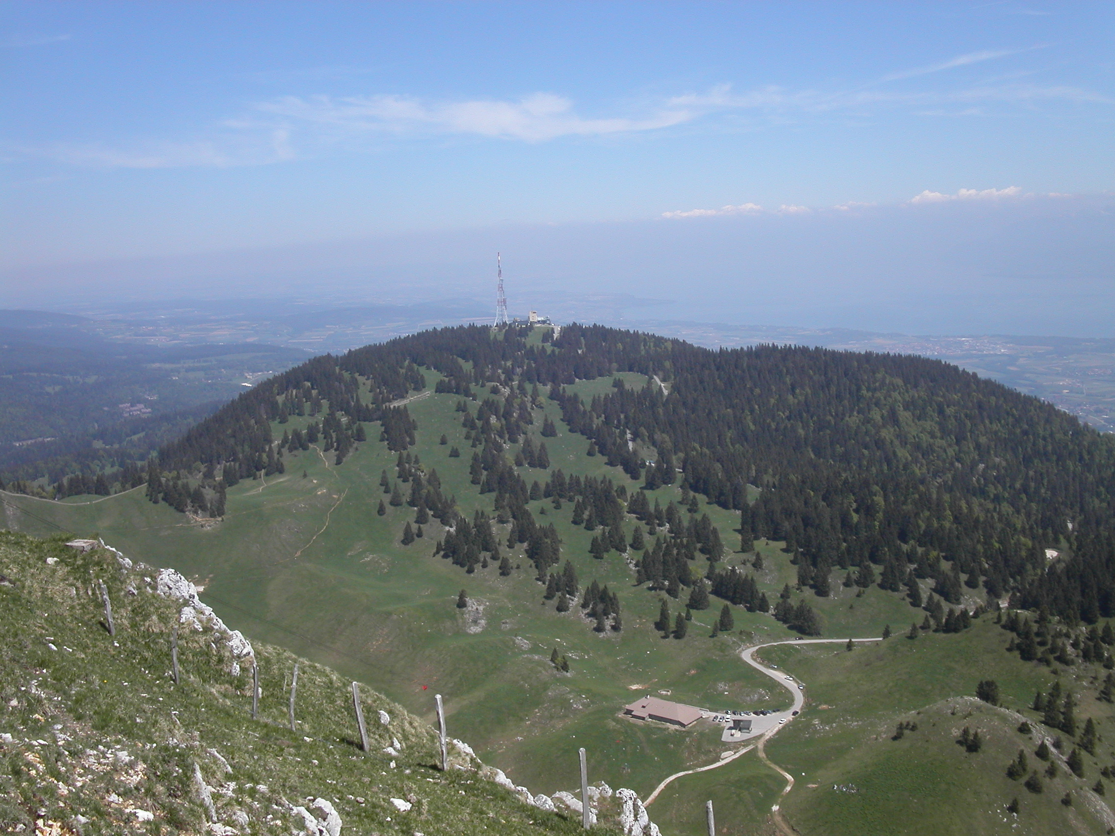 Sommet de la Barillette vue de La Dôle Auteur : Utilisateur:Marc Mongenet Licence : GFDL Utilisateur:Marc Mongenet